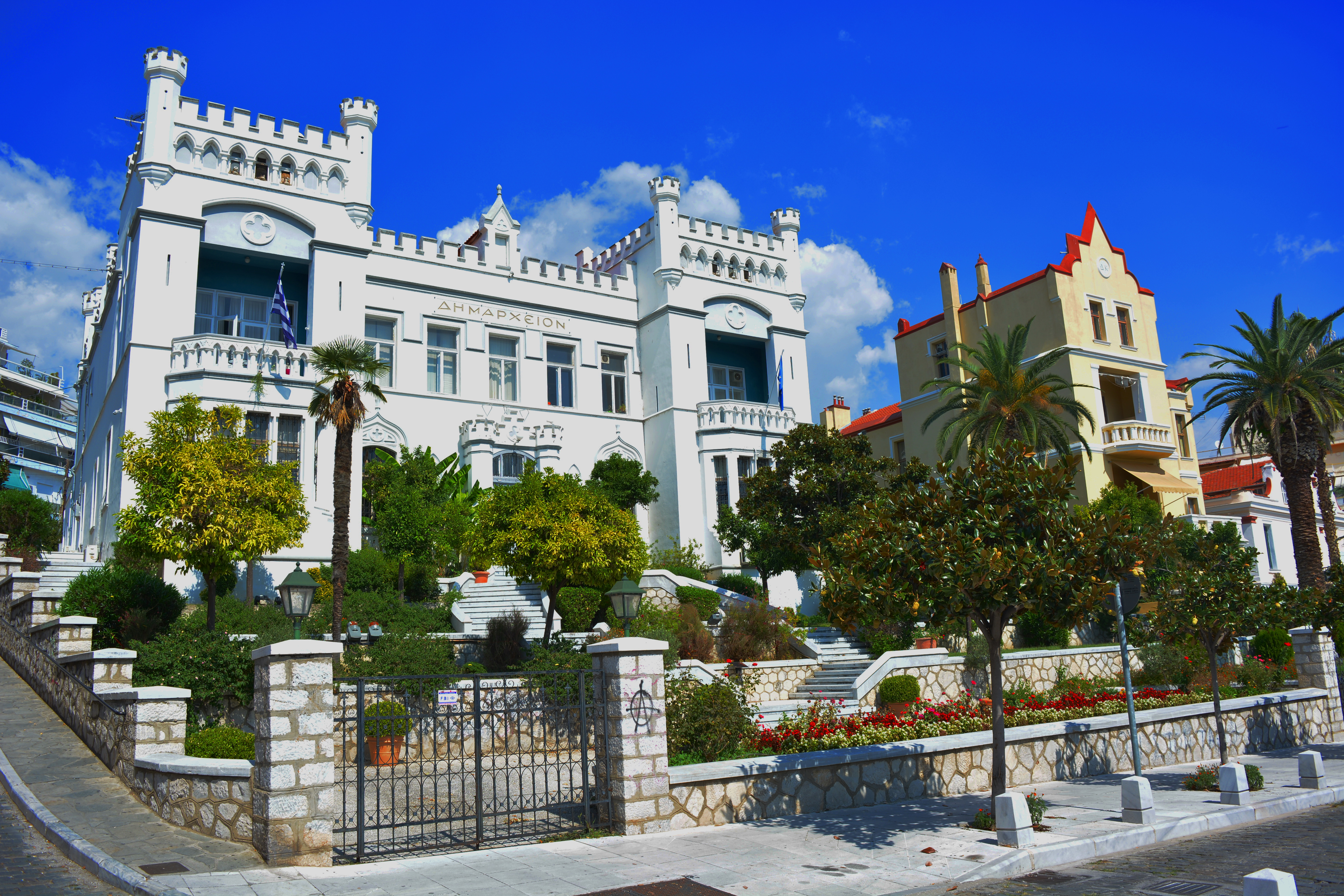 Δημαρχείο Καβάλας«Δημαρχείο Καβάλας»